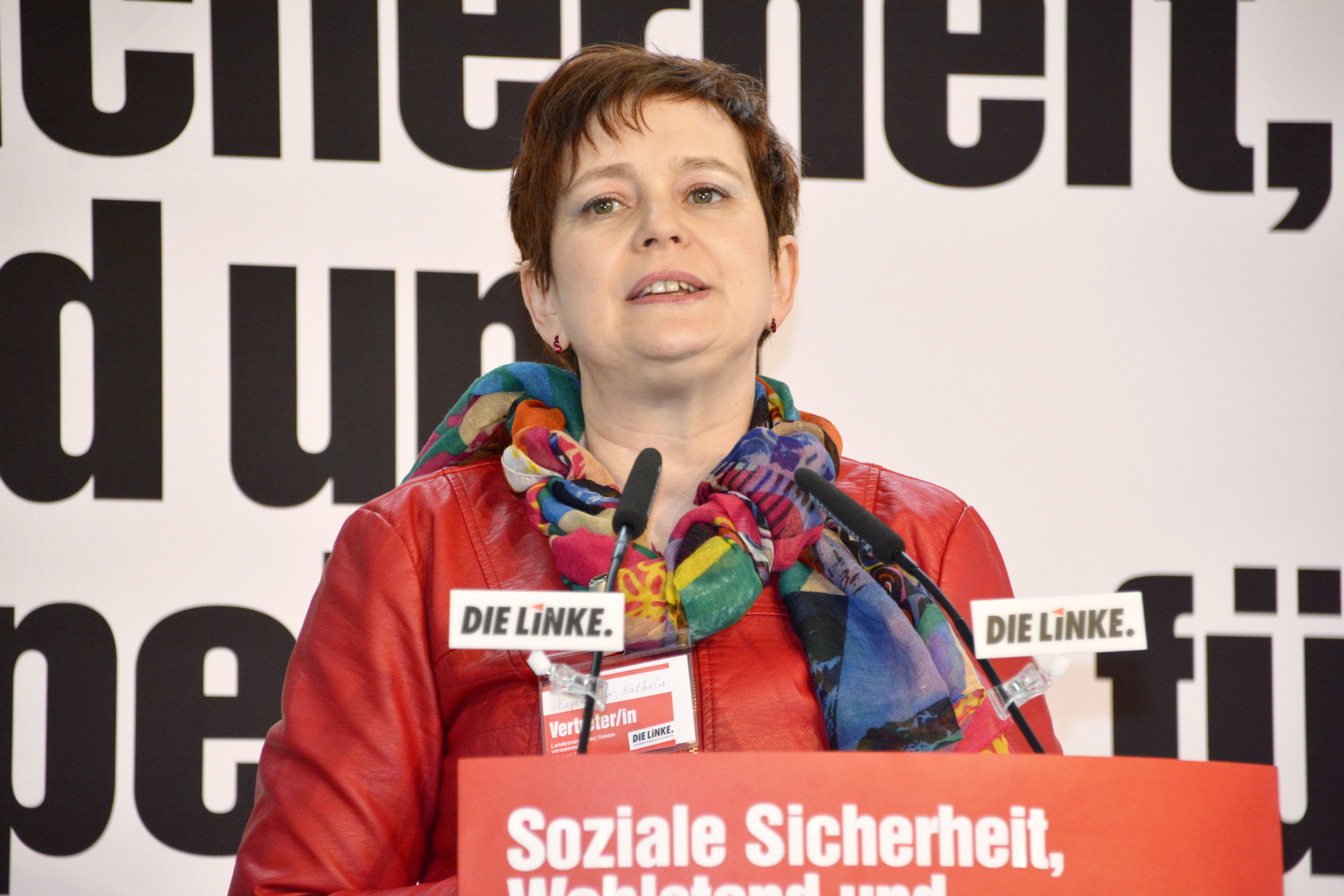 Kathrin Kagelmann, Mitglied des Sächsischen Landtages